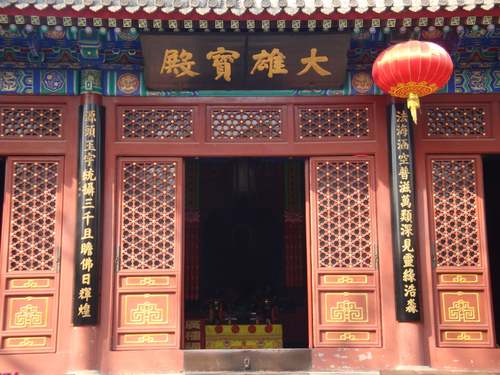 fayuan temple daxiongbaodian